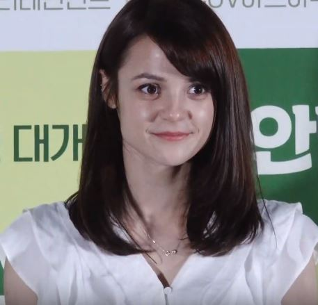 영화 '안녕 베일리'(감독 게일 맨쿠소) 언론시사회가 26일 오후 서울시 용산구 용산CGV에서 열렸다.